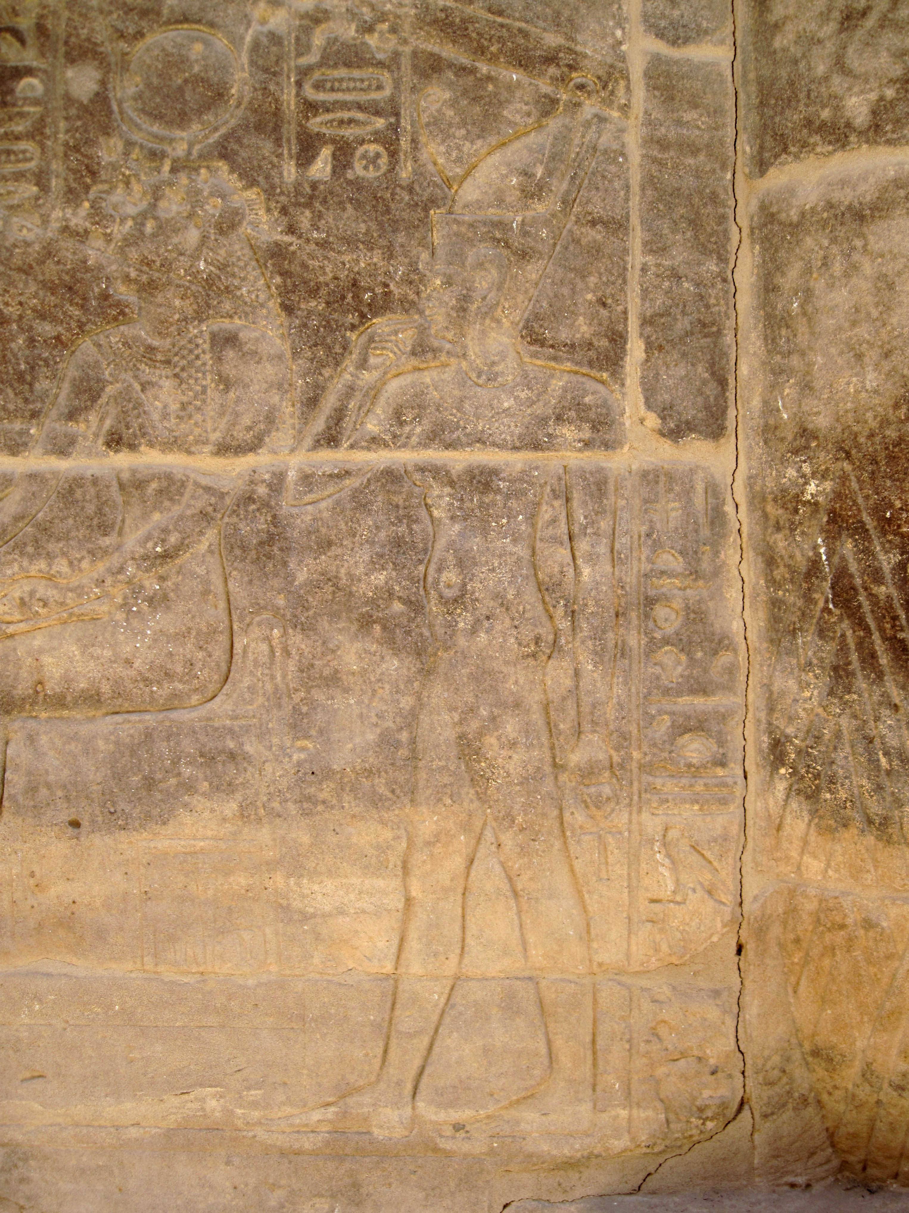 Relief auf einer Interkolumnienmauer am Kiosk des Nektanebos I. vor dem Isis-Tempel von Philae auf der Insel Agilkia, Ägypten